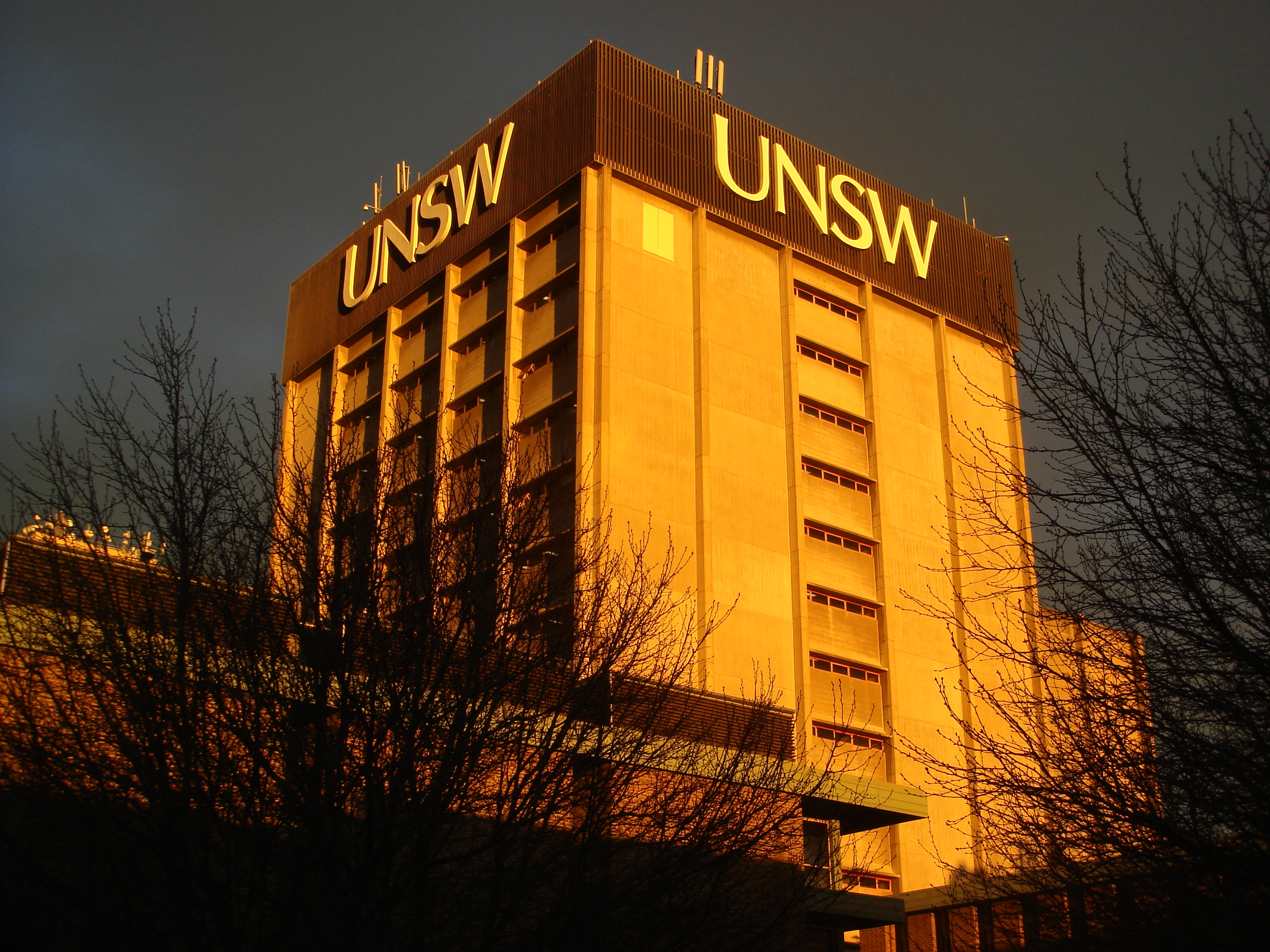 Bibliotheksgebäude auf dem Campus der UNSW